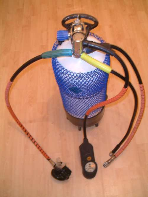 Equipement de plongée ; repris depuis en I took the photos myself - I give you permission to use them under the normal wikipedia terms. Mark